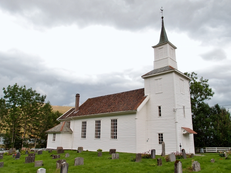 Bø kyrkje i Hyllestad kommune i Sogn og Fjordane.